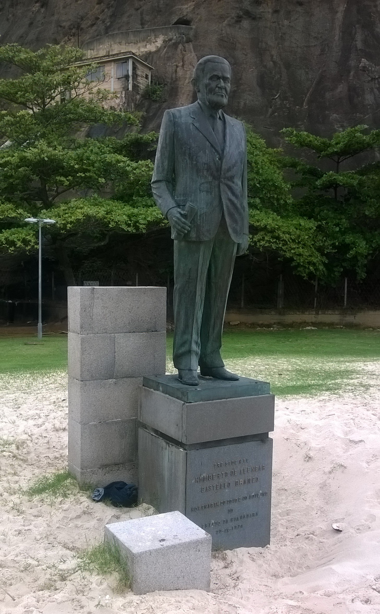 "Presidente / Humberto de Alencar / Castello Branco / Homenagem do Povo e do Governo / do / Estado da Guanabara / 20-IX-1974", Leme, Rio de Janeiro, RJ, Brasil